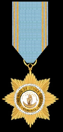 Eigen tekening